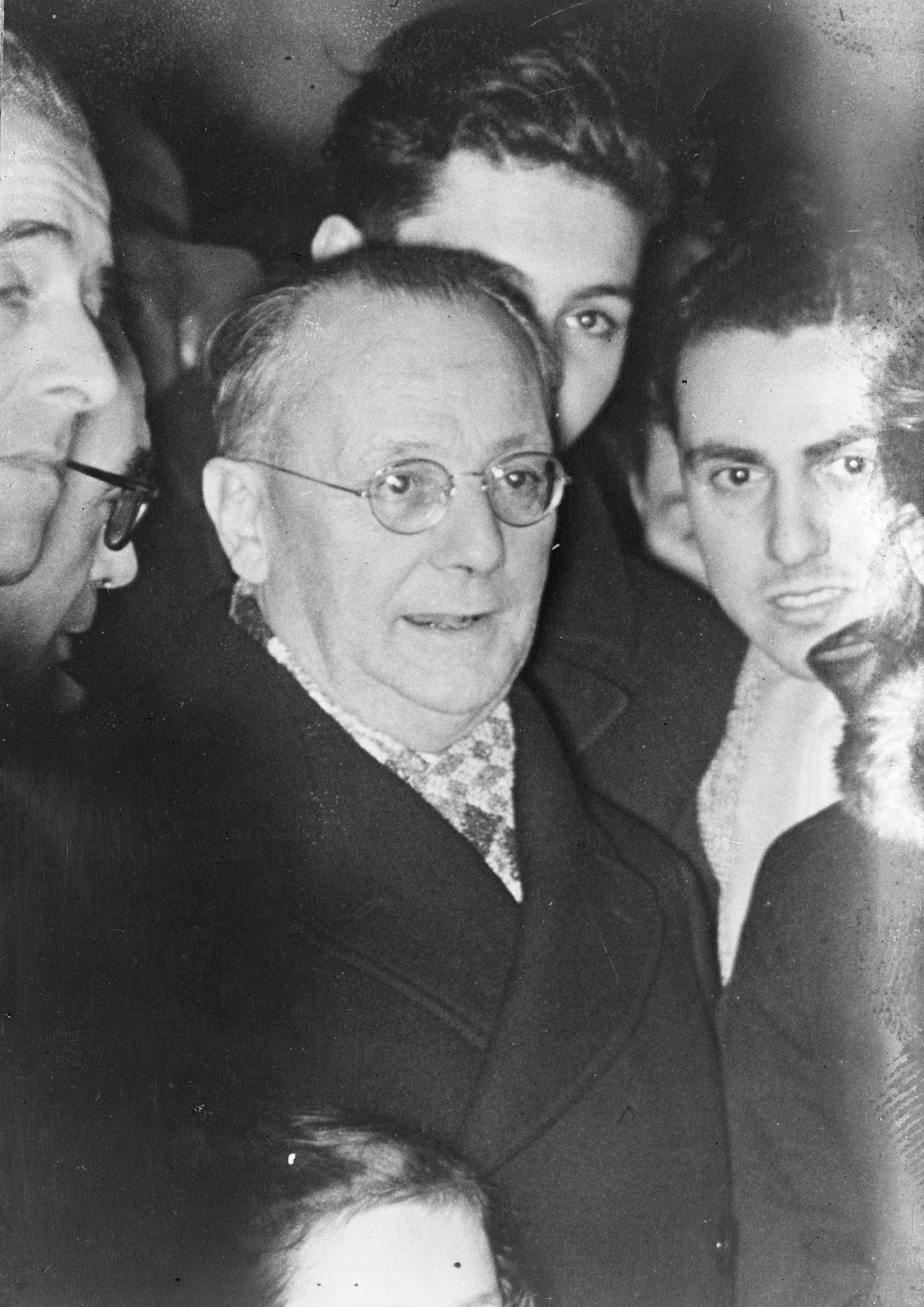 Collectie / Archief : Fotocollectie Anefo Reportage / Serie : [ onbekend ] Beschrijving : Jose Giral Republikein uit Spanje Datum : 28 februari 1946 Locatie : Spanje Trefwoorden : SPANJE Persoonsnaam : ginal jose Fotograaf : Agence France Presse (AFP) Auteursrechthebbende : Nationaal Archief Materiaalsoort : Glasnegatief Nummer archiefinventaris : bekijk toegang 2.24.01.09 Bestanddeelnummer : 901-5292